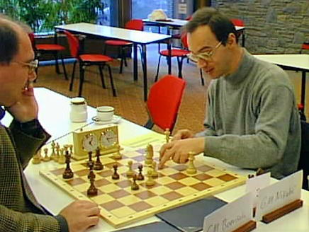 Uwe Boensch (links) und Predrag Nikolic (rechts), Deutsche Schachbundesliga 1998/99, Runde 6 am 13. Dezember 1998 in Solingen.